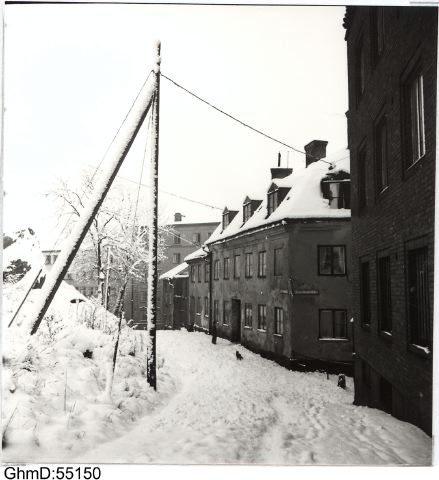 Övre Kyrkogatan, Göteborg, 1950, GhmD-55150